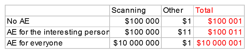 Монгол: 2+5+